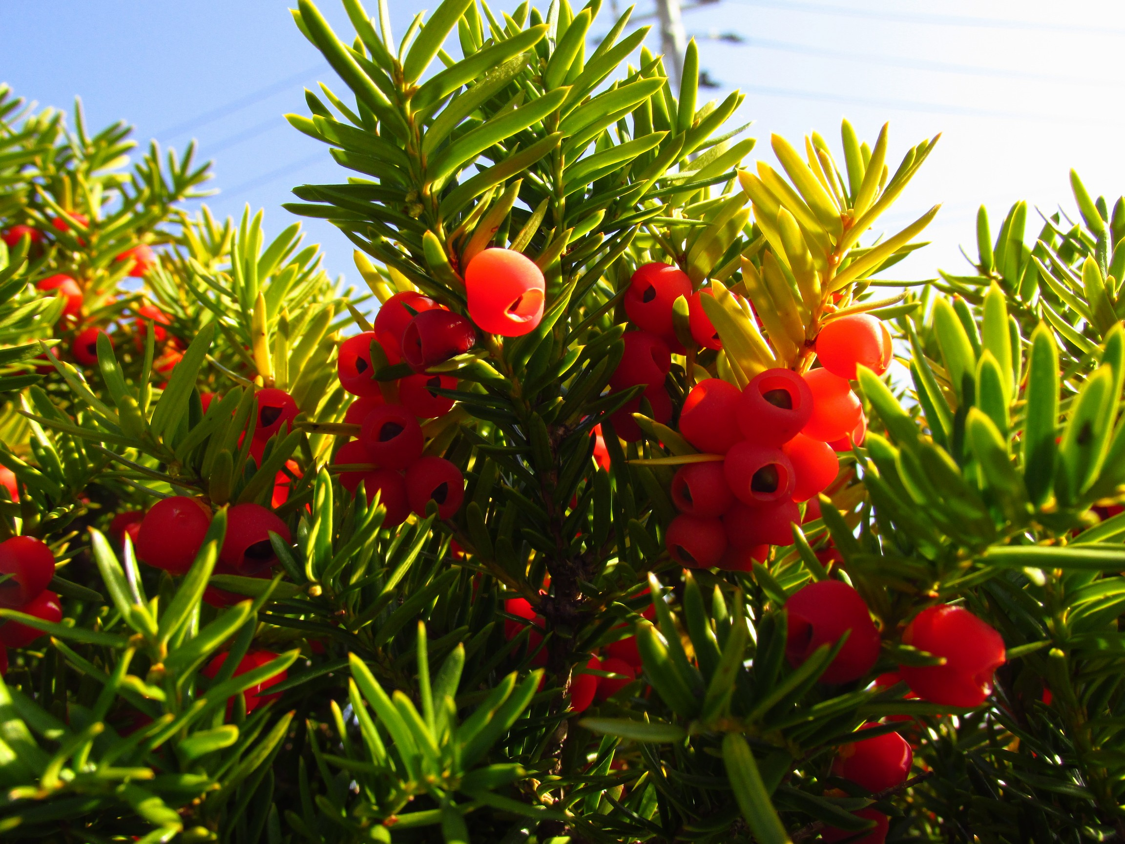 日本国,青森県青森市,イチイ,果実